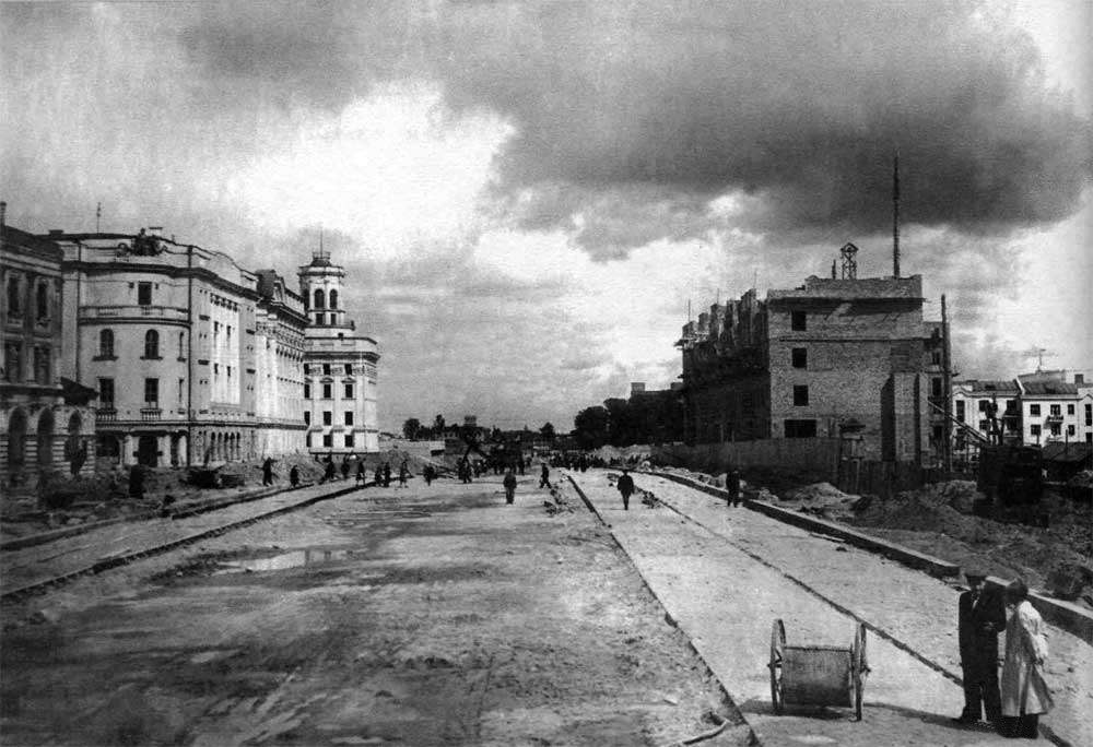 Беларуская (тарашкевіца): Вуліца савецкая ў жніўні 1941 году, Менск.